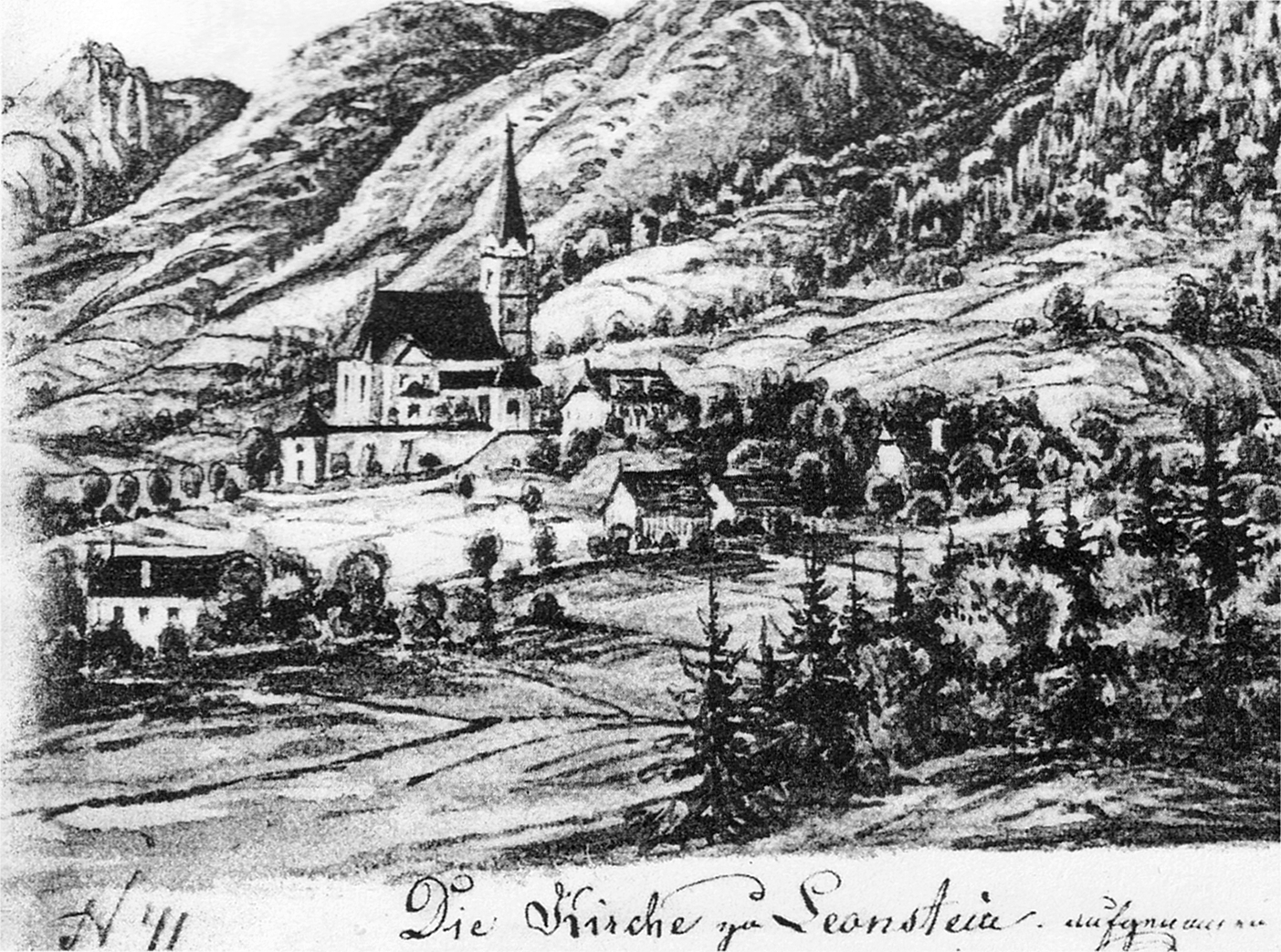 Leonstein in einer Ansicht von 1847